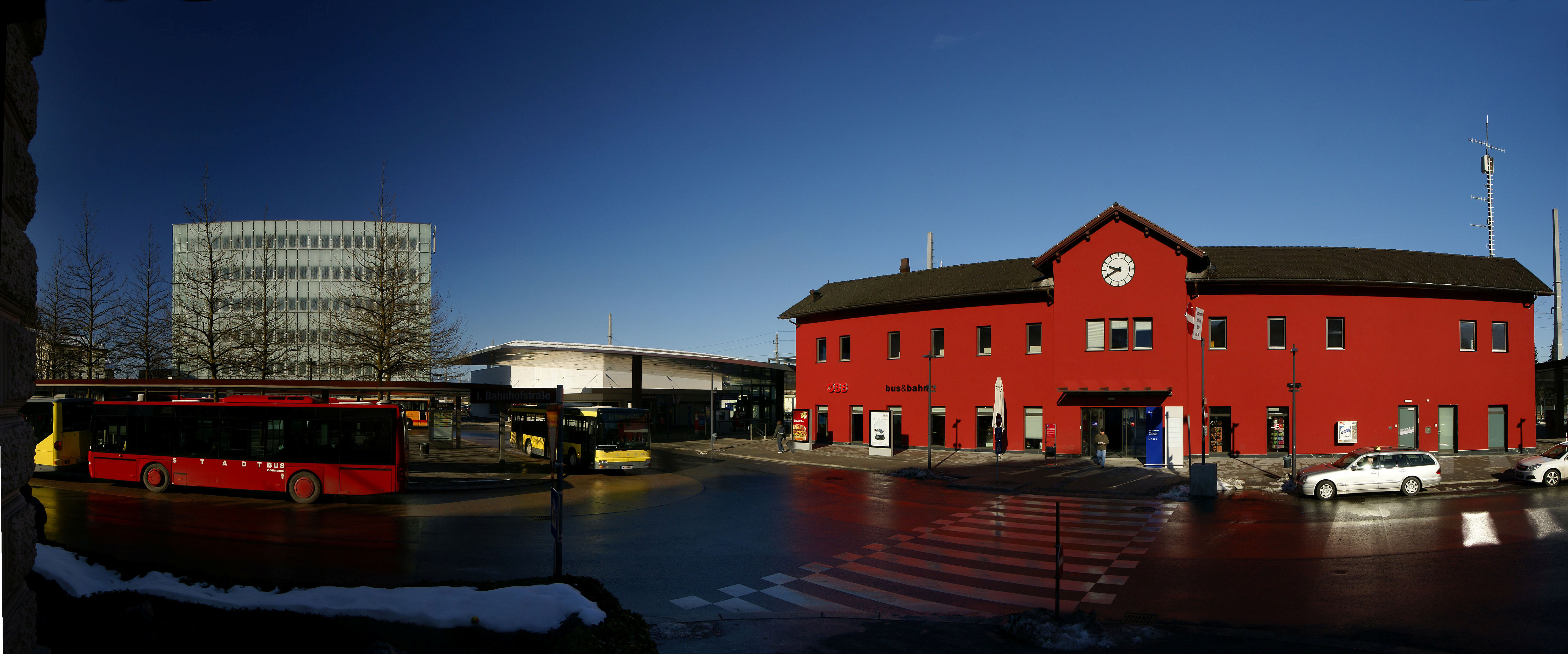 Busbahnhof und Bahnhof Dornbirn, in Vorarlberg. Im Bild Busse des Stadtbus Dornbirn und des Landbus Unterland. Im Hintergrund das aus den 60er Jahren gebaute und 2008 durch ein Gemeinschaftsprojekt der Bauunternehmen Schertler-Alge und Rhomberg Bau generalsanierte Postgebäude mit vorgesetzter Glasfassade und rechts das ebenfalls sanierte Bahnhofsgebäude der ÖBB.